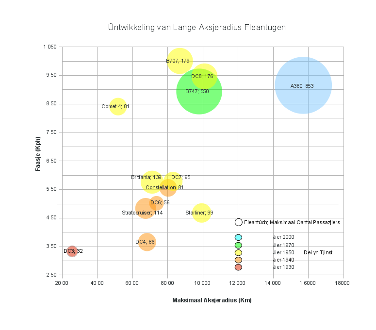 Ûntwikkeling van Lange Aksjeradius Fleantugen